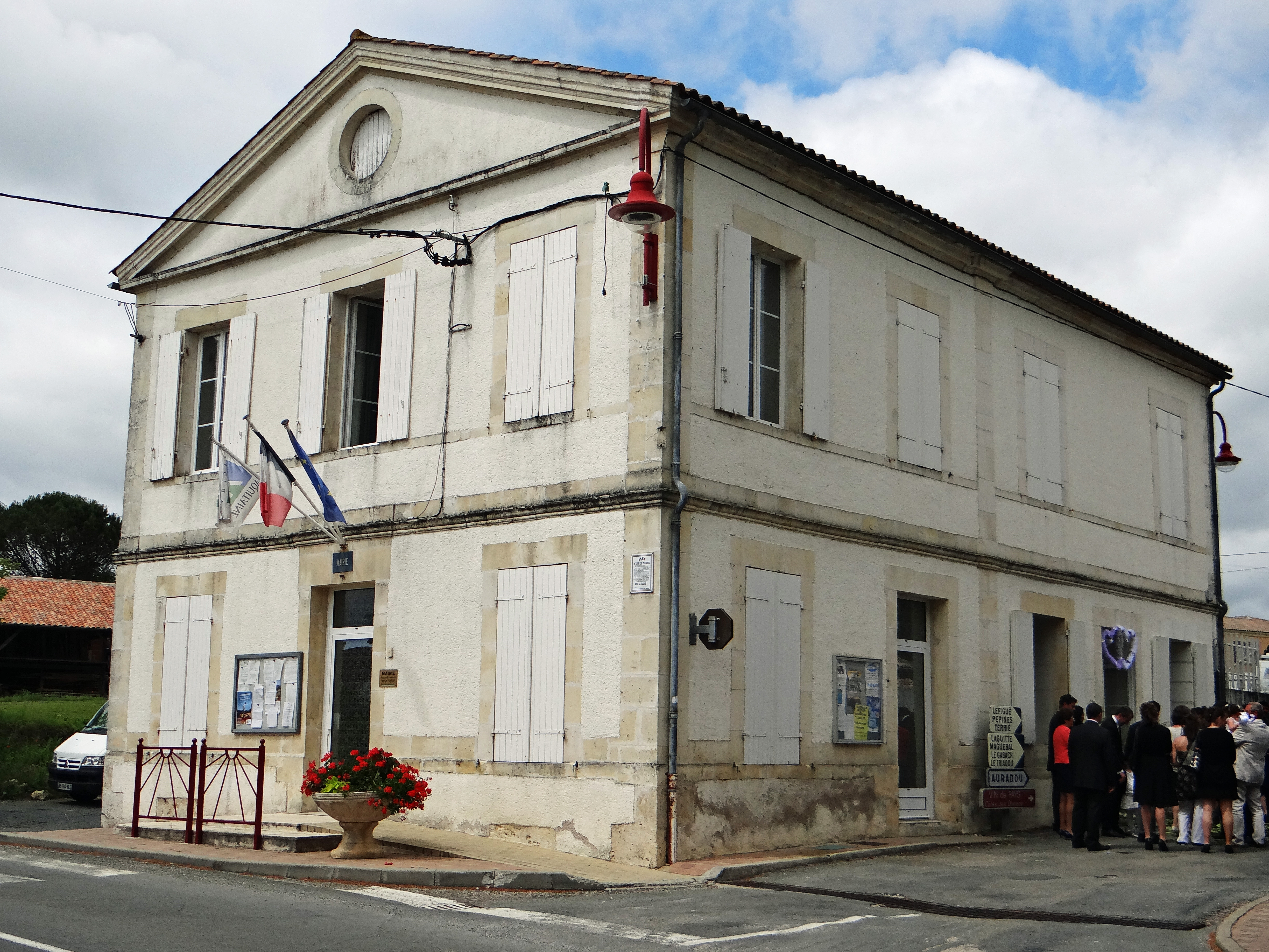 Hautefage-la-Tour - Mairie